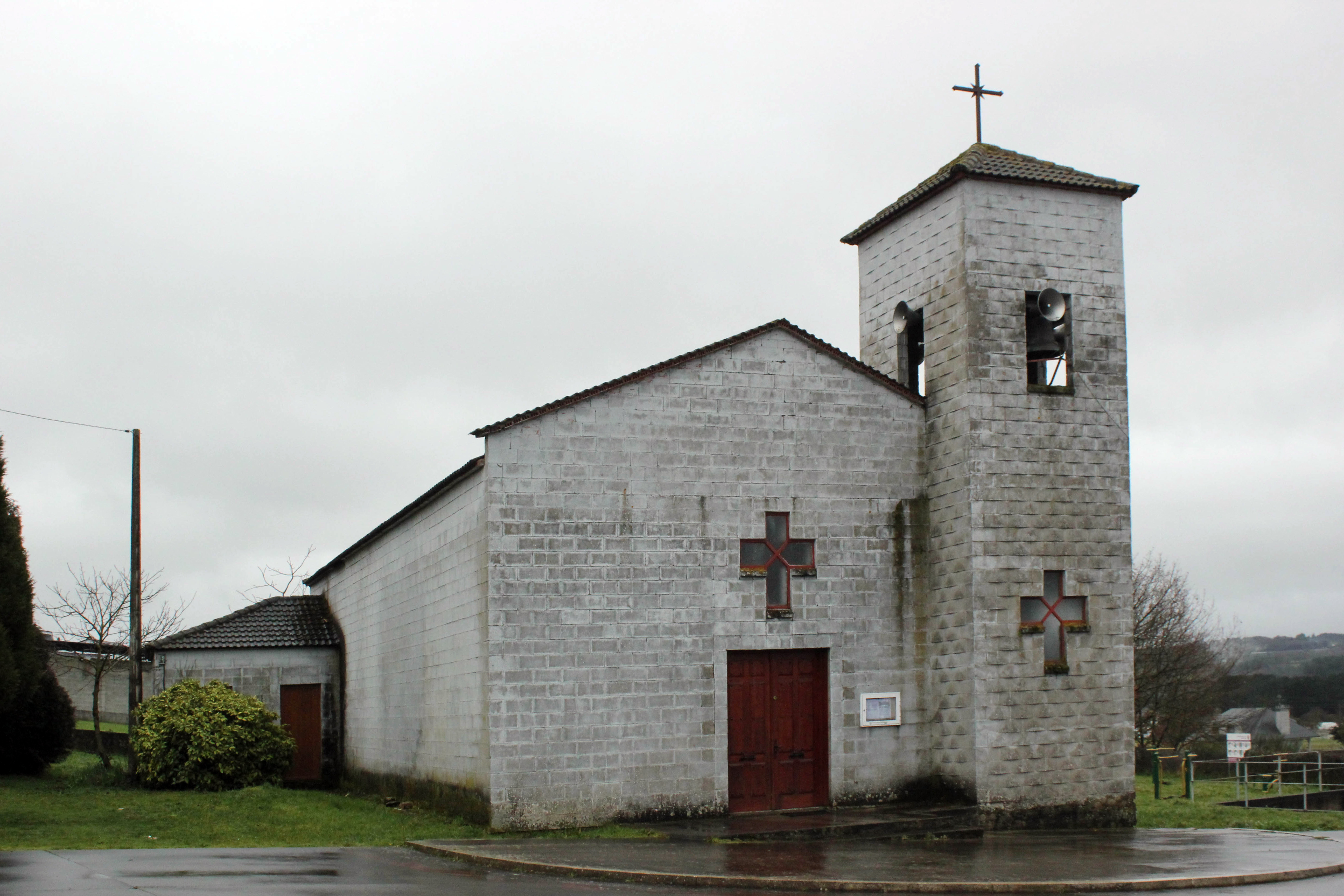 Igrexa de San Salvador de Guntín de Pallares, no concello da Guntín.